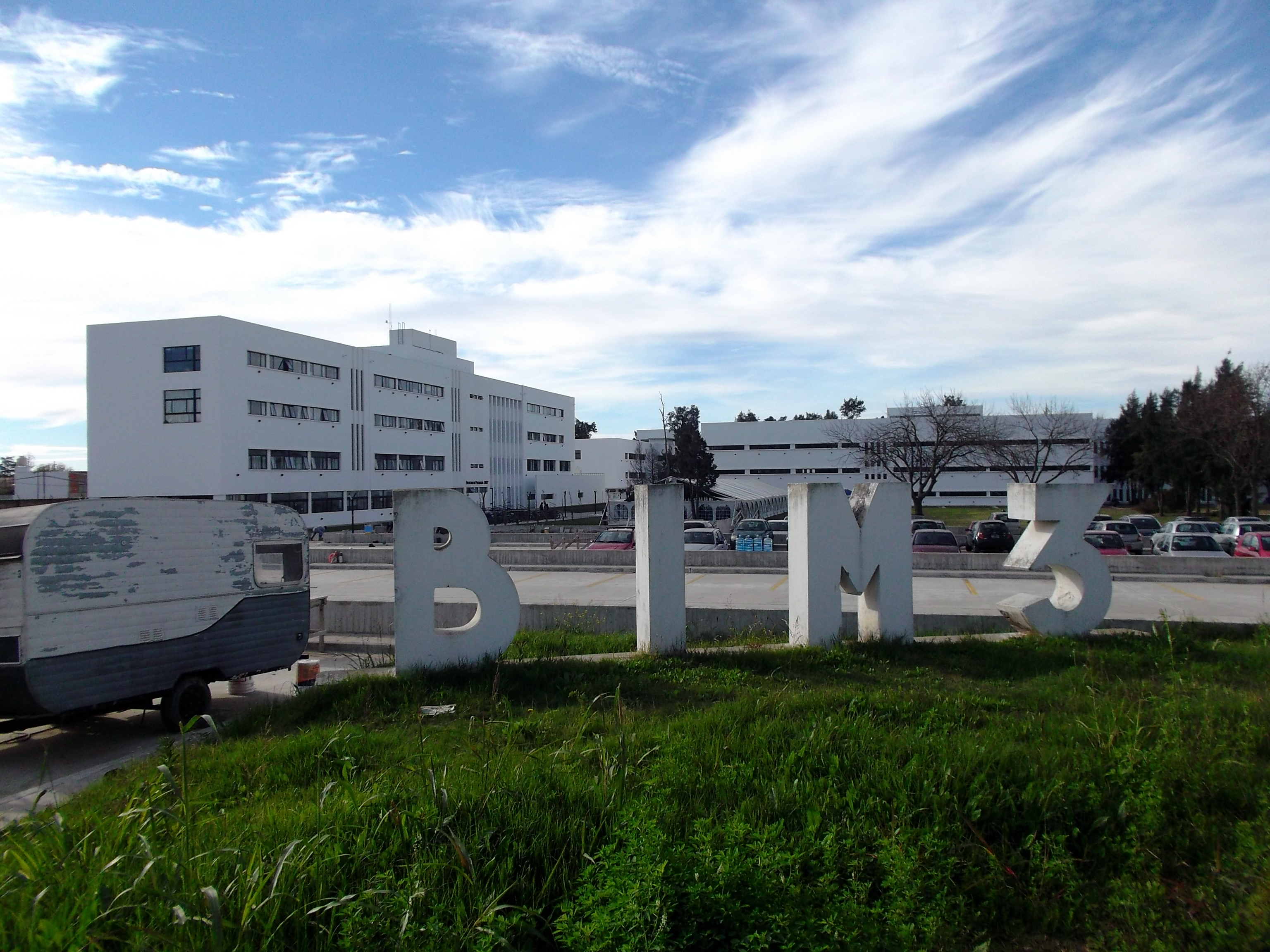 Vista del predio del ex BIM 3 de La Plata, hoy Grupo Bosque Norte de la Universidad Nacional de La Plata. Fotografía: Eric Hamilton